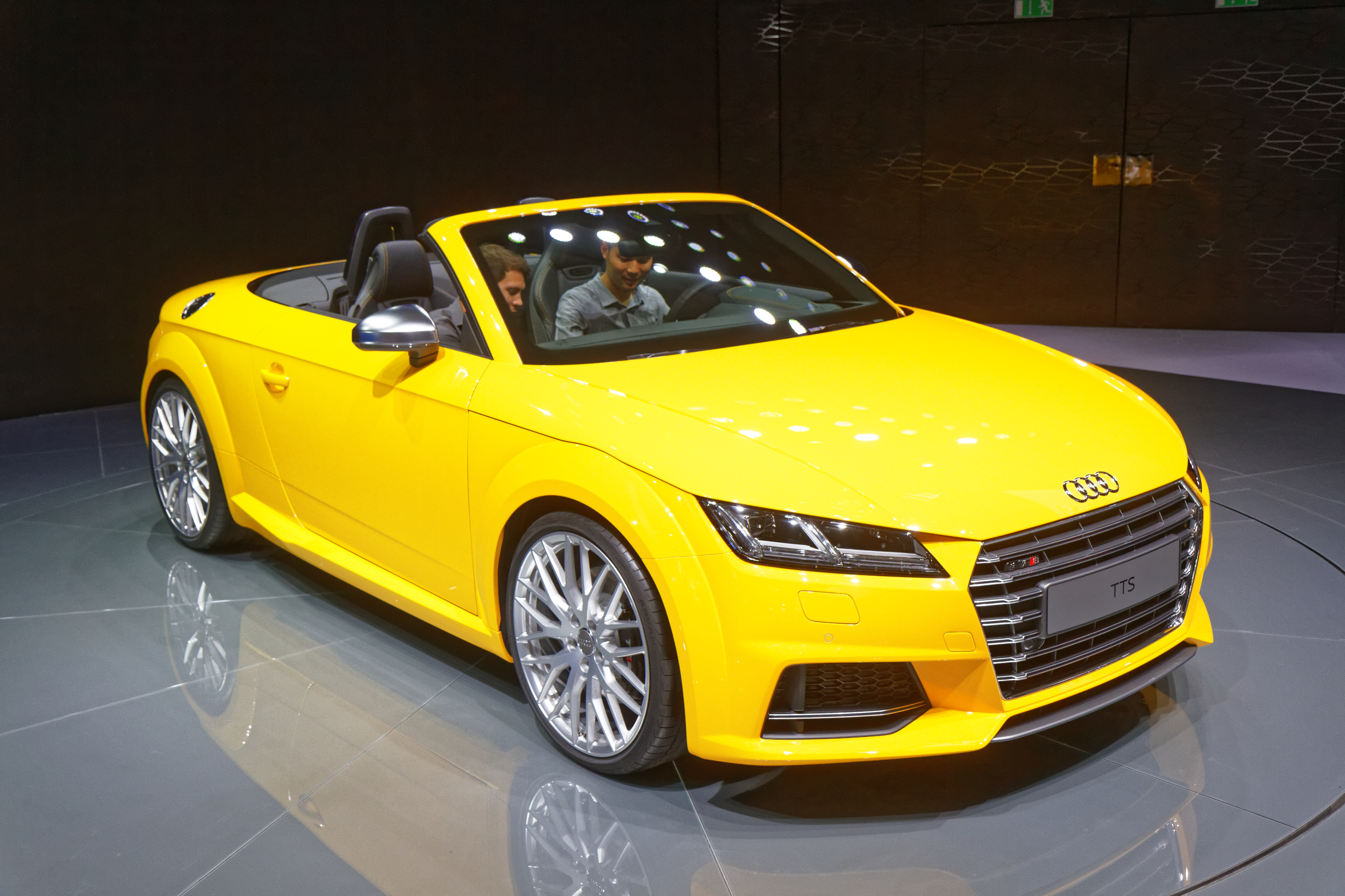 Une Audi TTS présentée lors du mondial de l'automobile de Paris 2014.